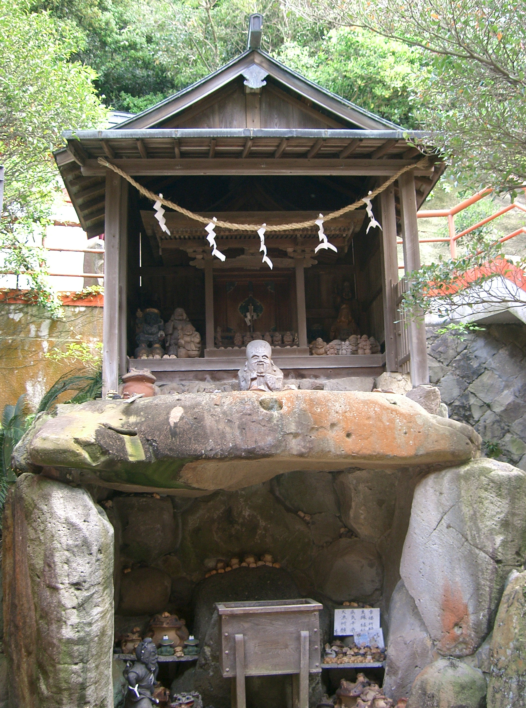 淡島神社 大国主社